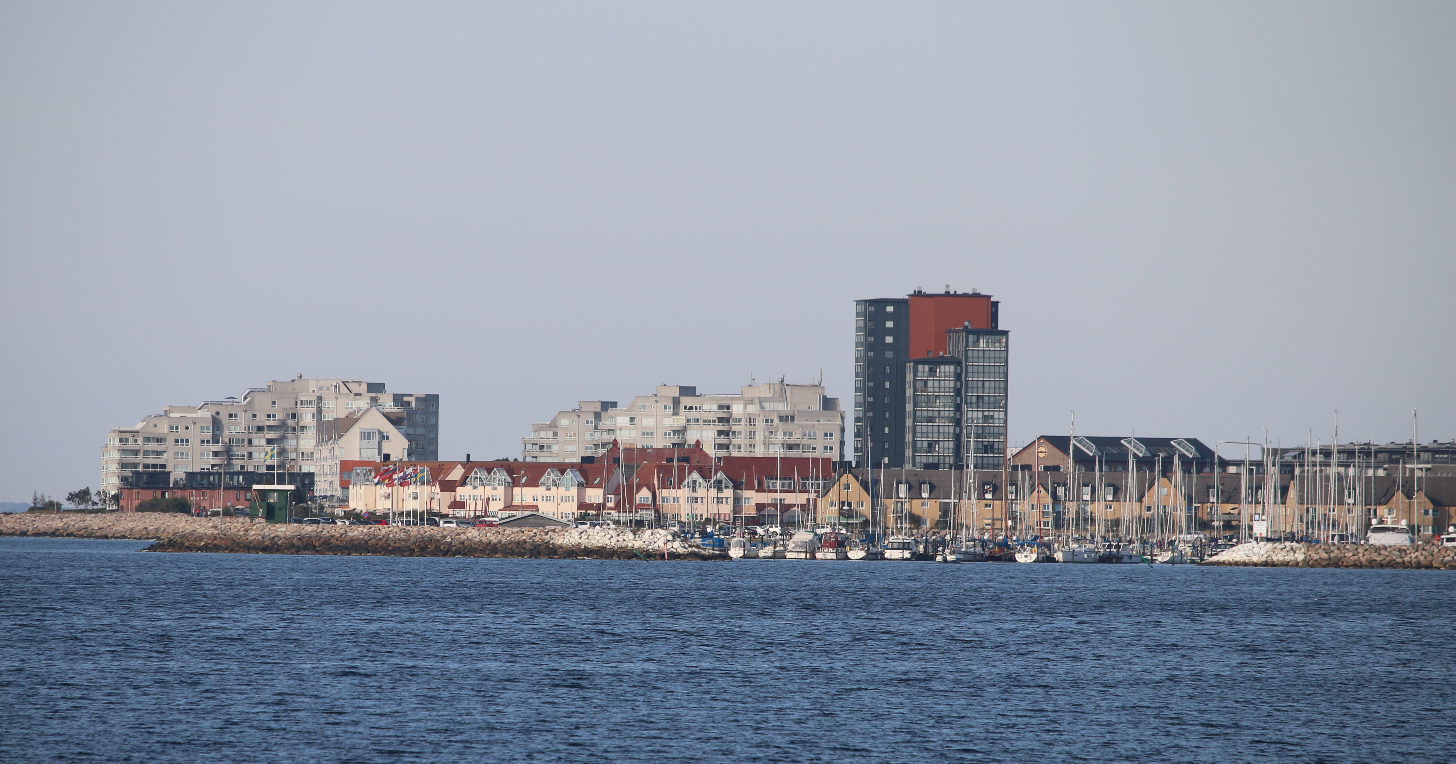 Ön i Limhamn från söder